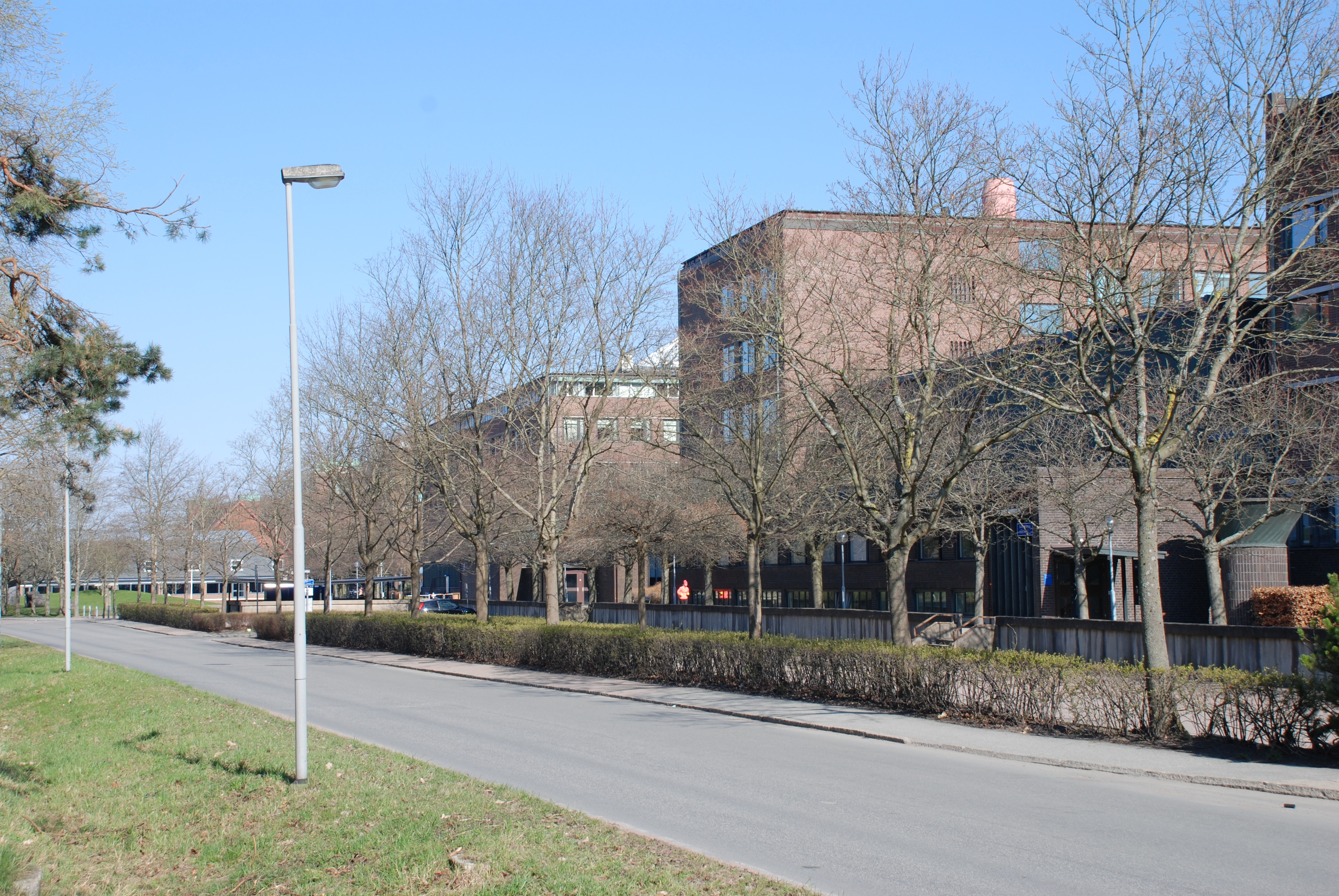 Sven Hultins Gata på Chalmers område i stadsdelen Johanneberg i Göteborg. Byggnaderna tillhör Chalmers sektion Väg och vatten.